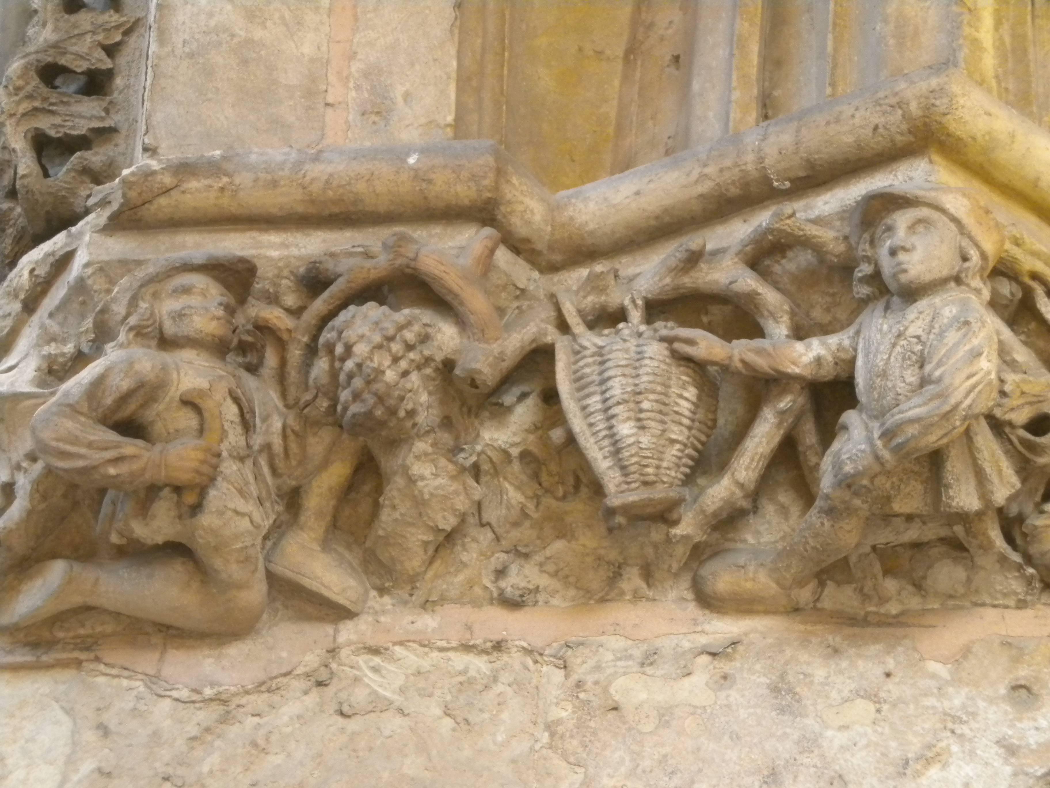 Scène de vendanges sur la façade de Hôtel de ville de Saint Quentin (début XVIe siècle).